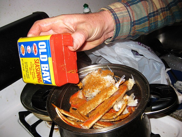 MeSoHungry foodblog post